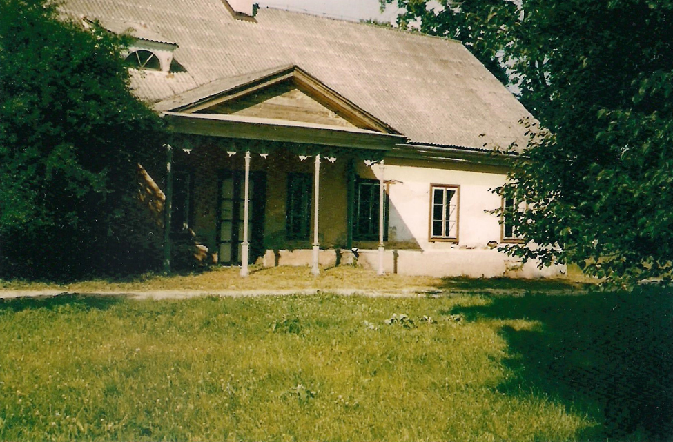 Zdjęcie dworu Państwa Jagnińskich wykonane w roku 2011. W 2014 został zburzony, ze względu na zły stan techniczny. Obecnie w miejscu dworu funkcjonuje Dom Pomocy Społecznej w Zochcinku dla osób przewlekle psychicznie chorych.